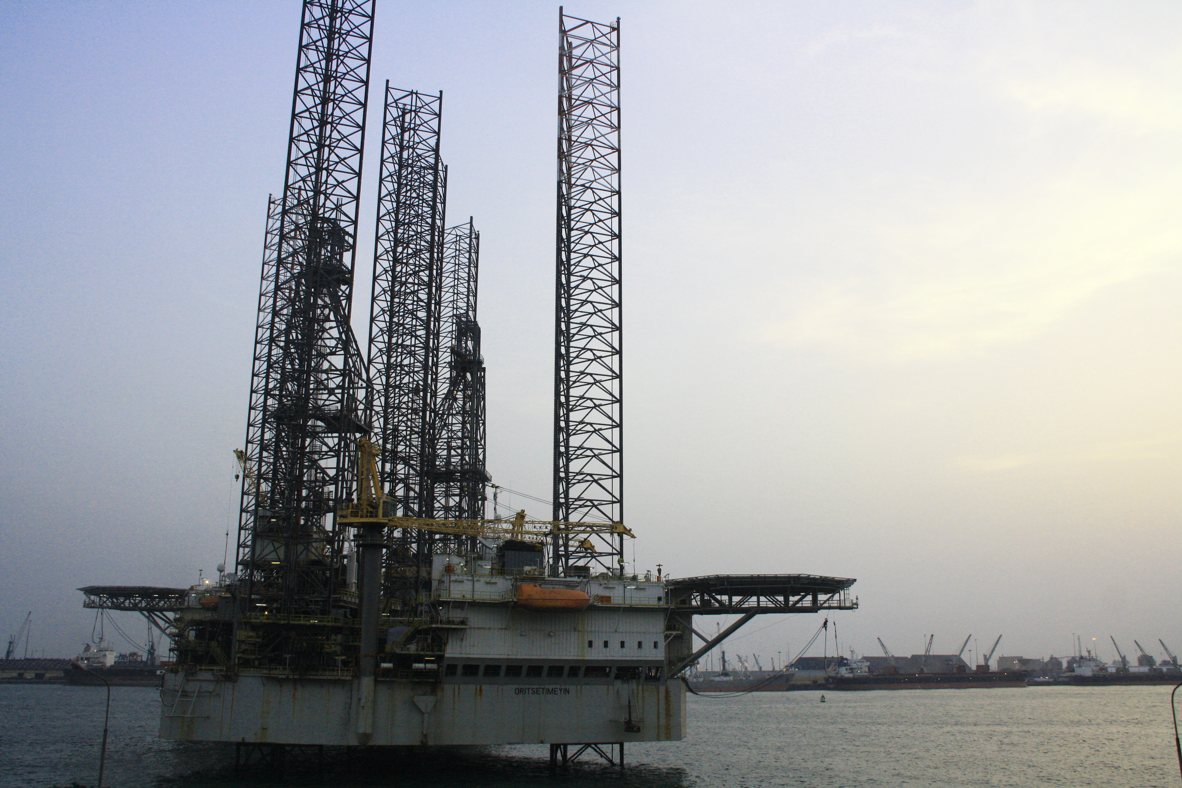 Plataforma de petróleo em Lagos, Nigéria.